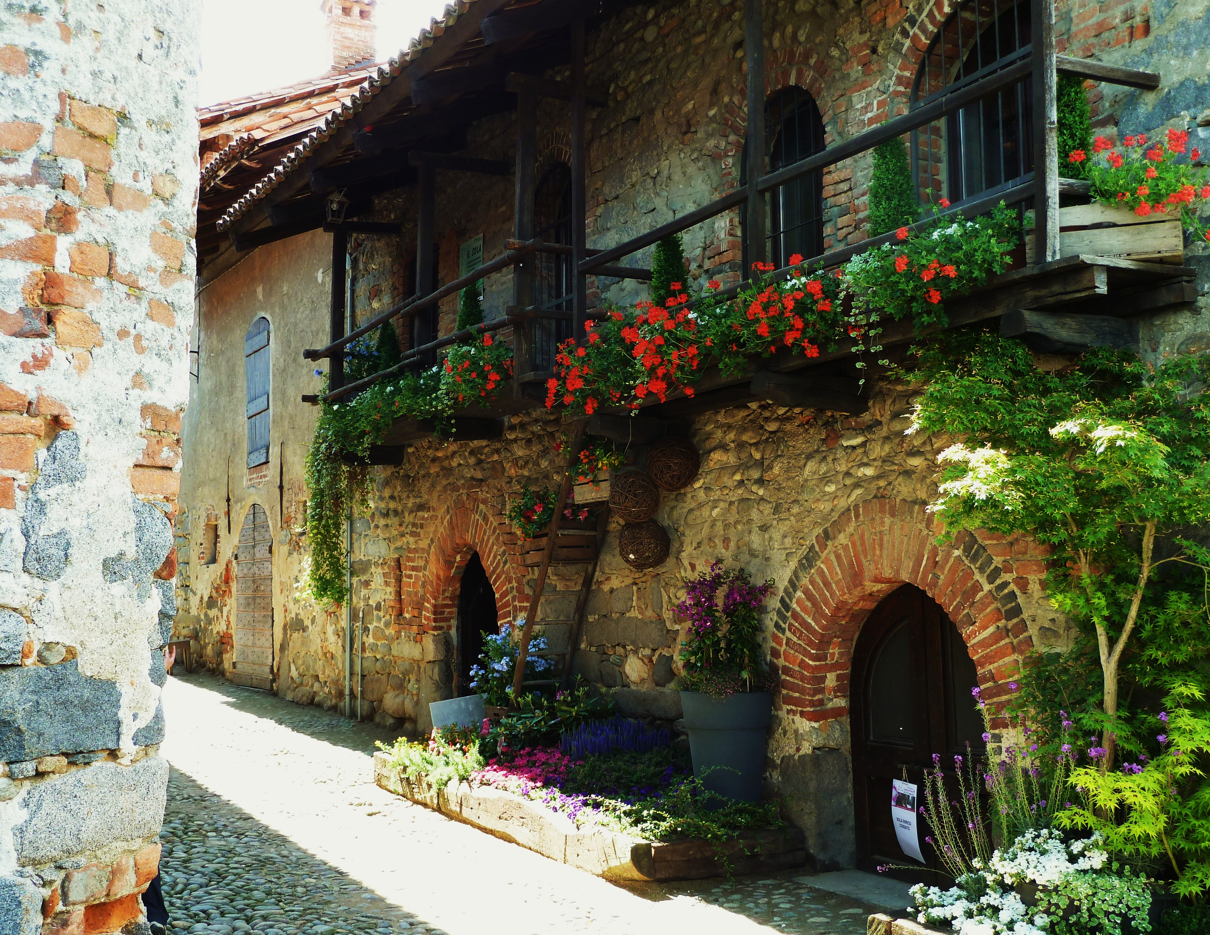 Ricetto medievale di Candelo (spazi esterni dentro e fuori le mura) This is a photo of a monument which is part of cultural heritage of Italy.